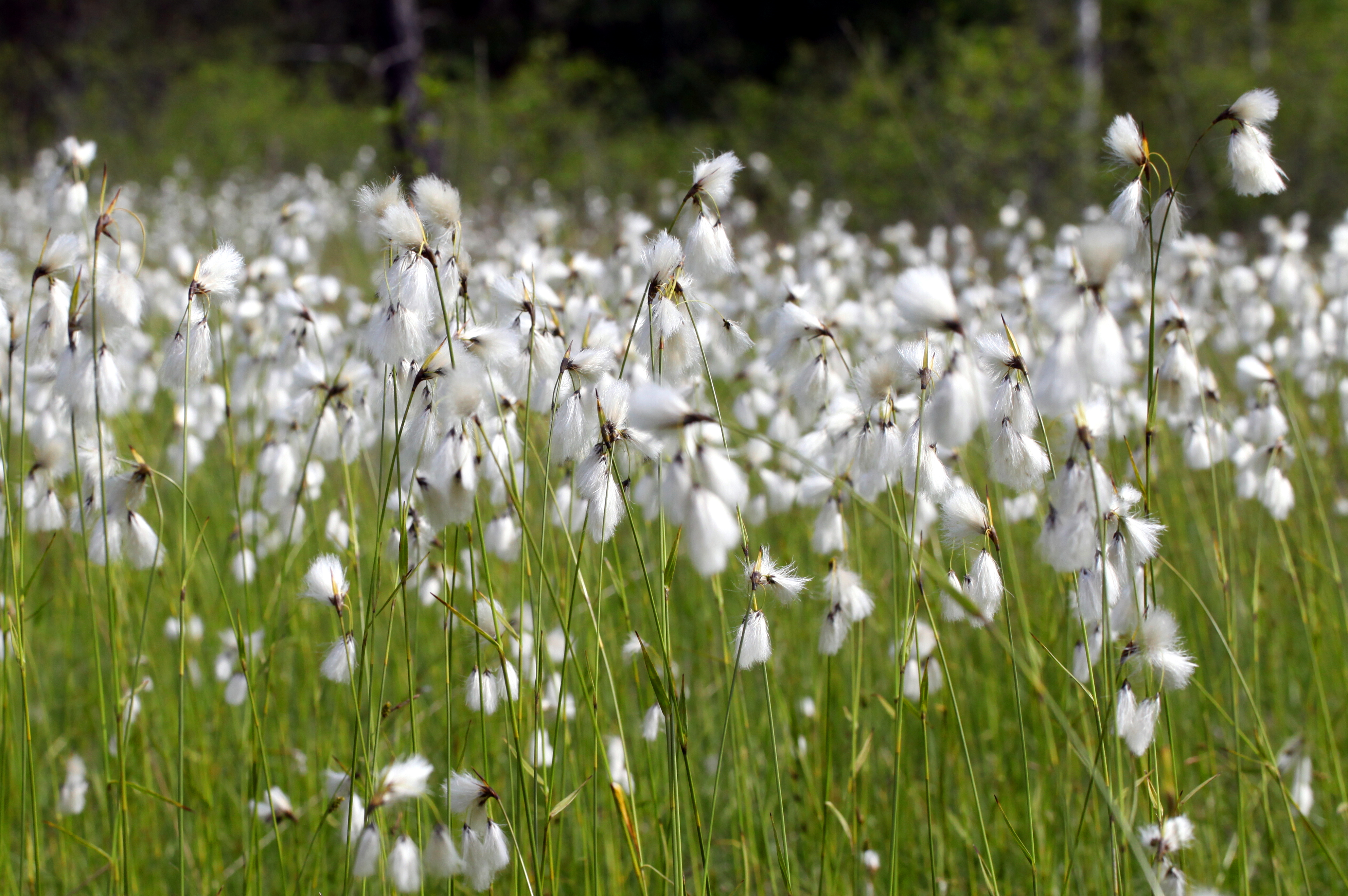 Des linaigrettes en pleine floraison dans la pelouse du vallon de Fontenelay